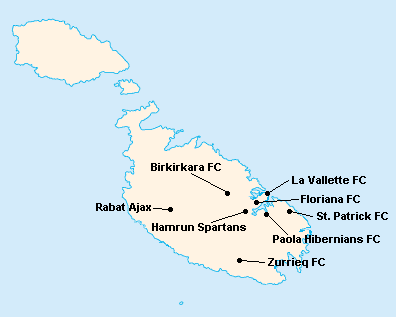 Répartition des clubs en Premier League Maltaise 1983-1984.